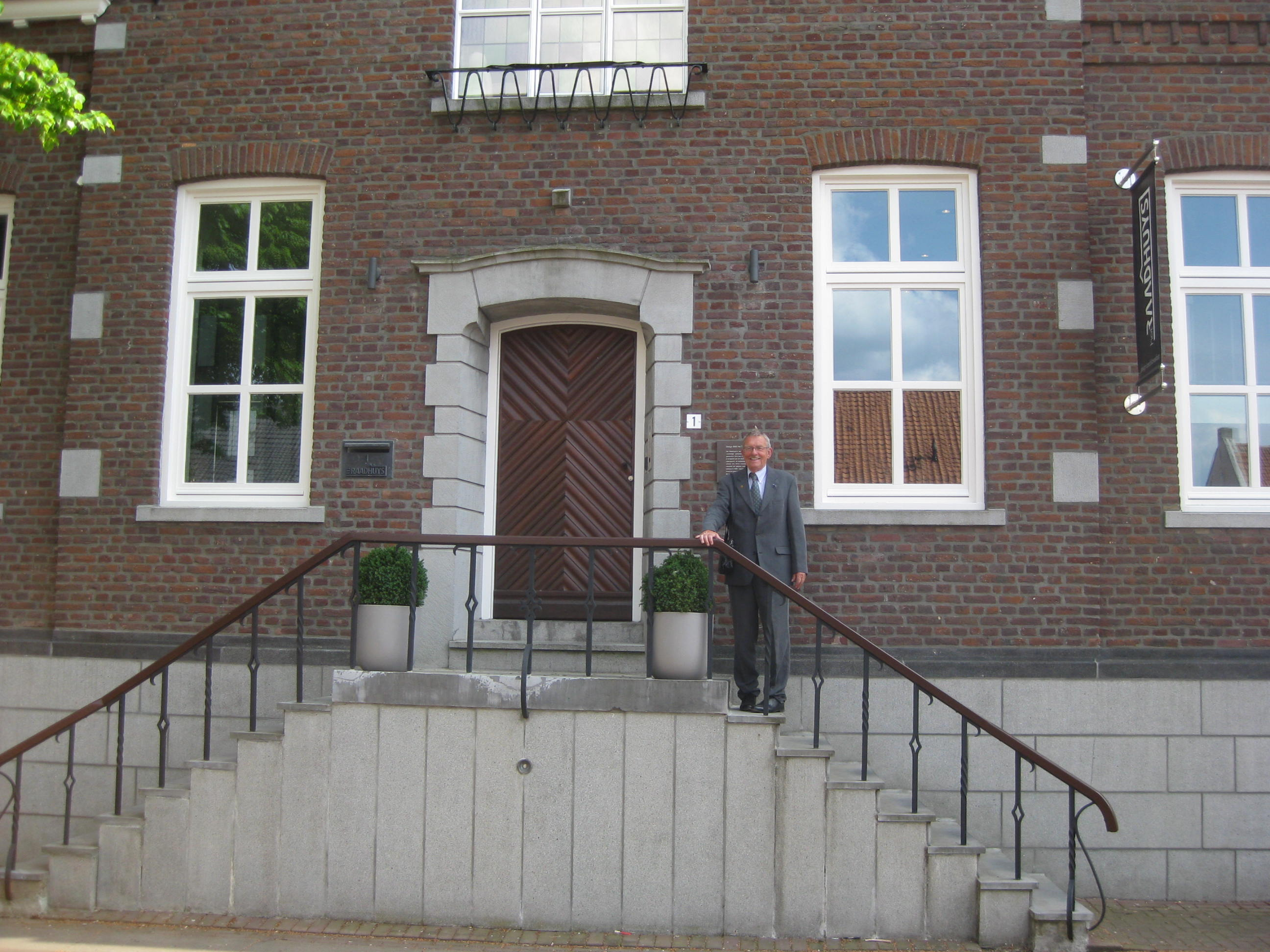 Oud-burgemeester Frans Jacobs voor het voormalig gemeentehuis in Kessel.